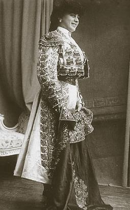 La cantante española Amalia Molina